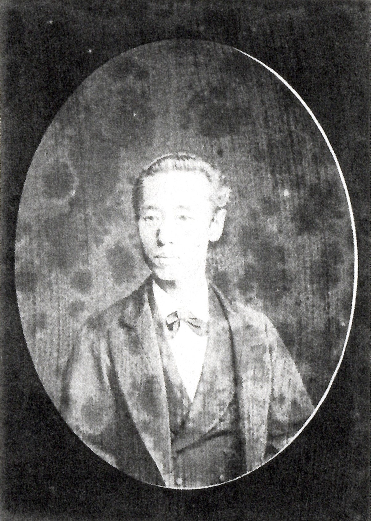 保科正益の肖像写真。